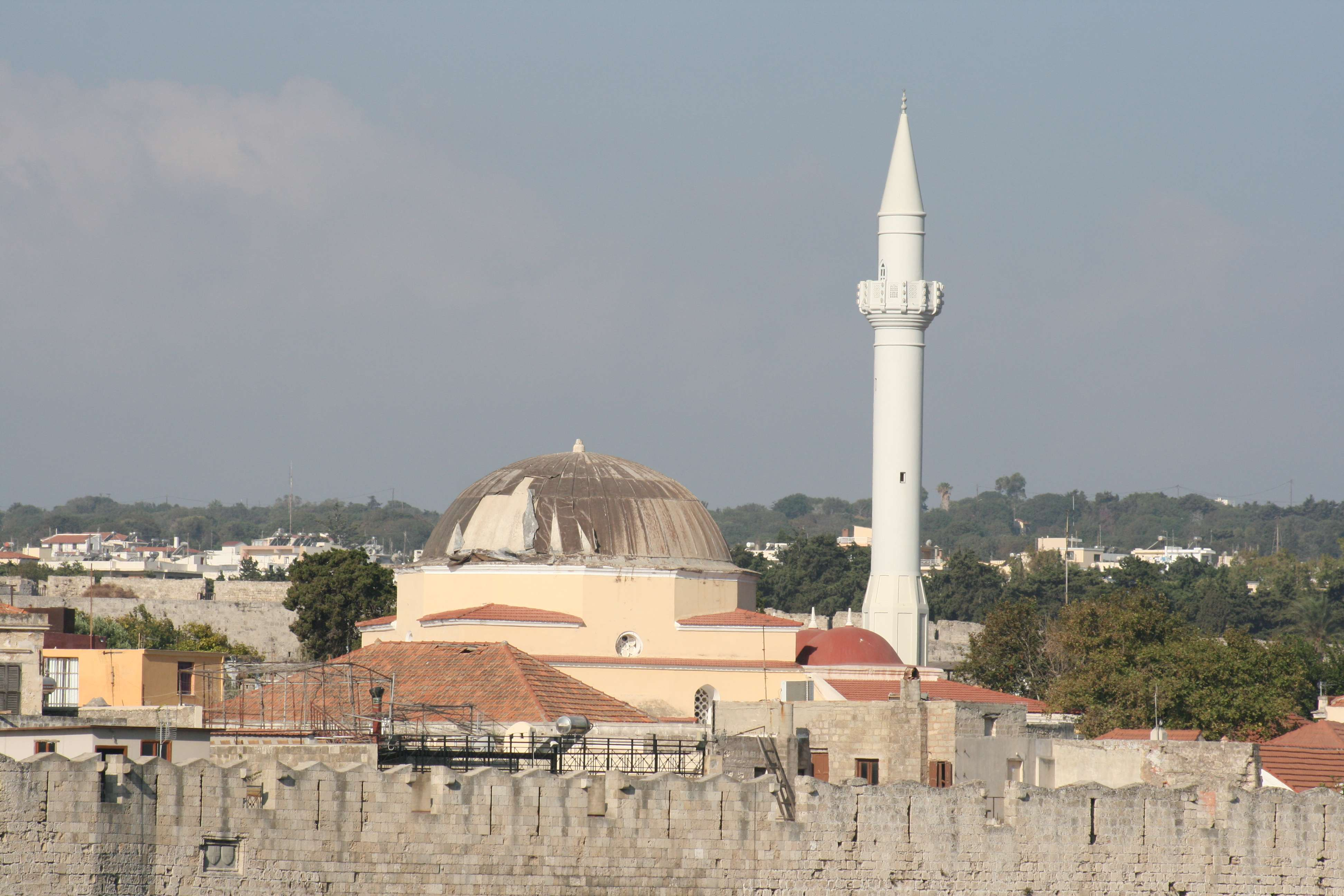 Rodi: Moschea di Ibrahim Pascià vista dal porto commerciale